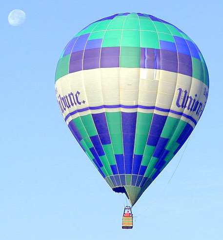 montgolfière - domaine public